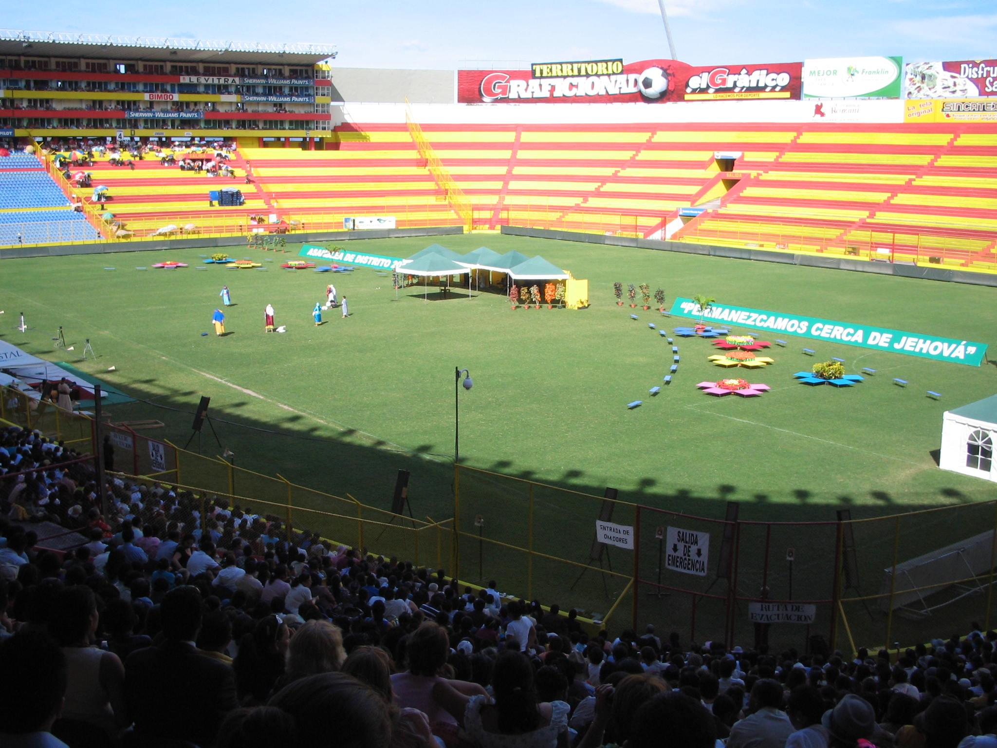 Vista del campo del Estadio Cuscatlán, en una Asamblea de Testigos de Jehovah.